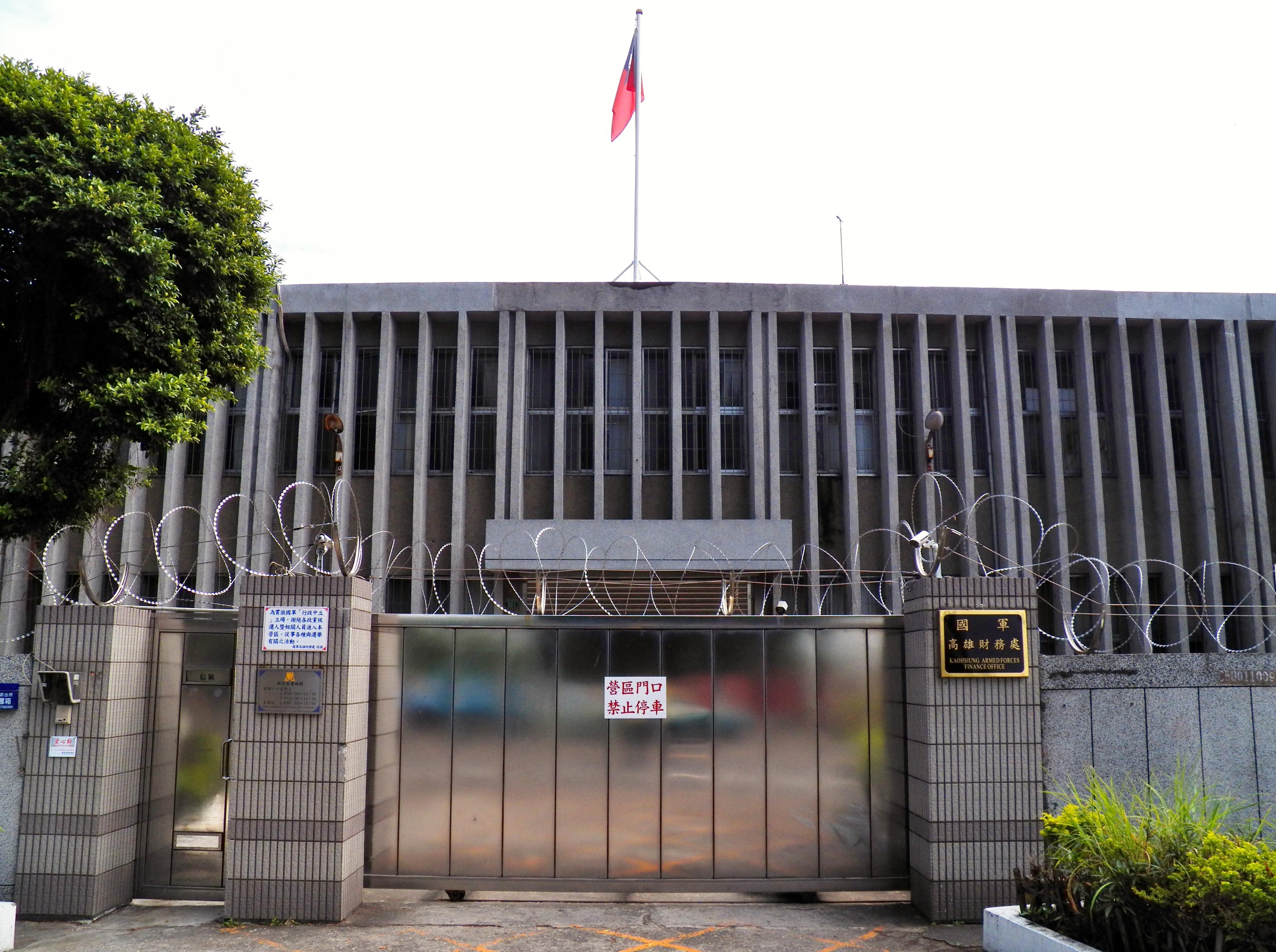 國軍高雄財務處，地址：高雄市鳳山區王生明路2之5號。